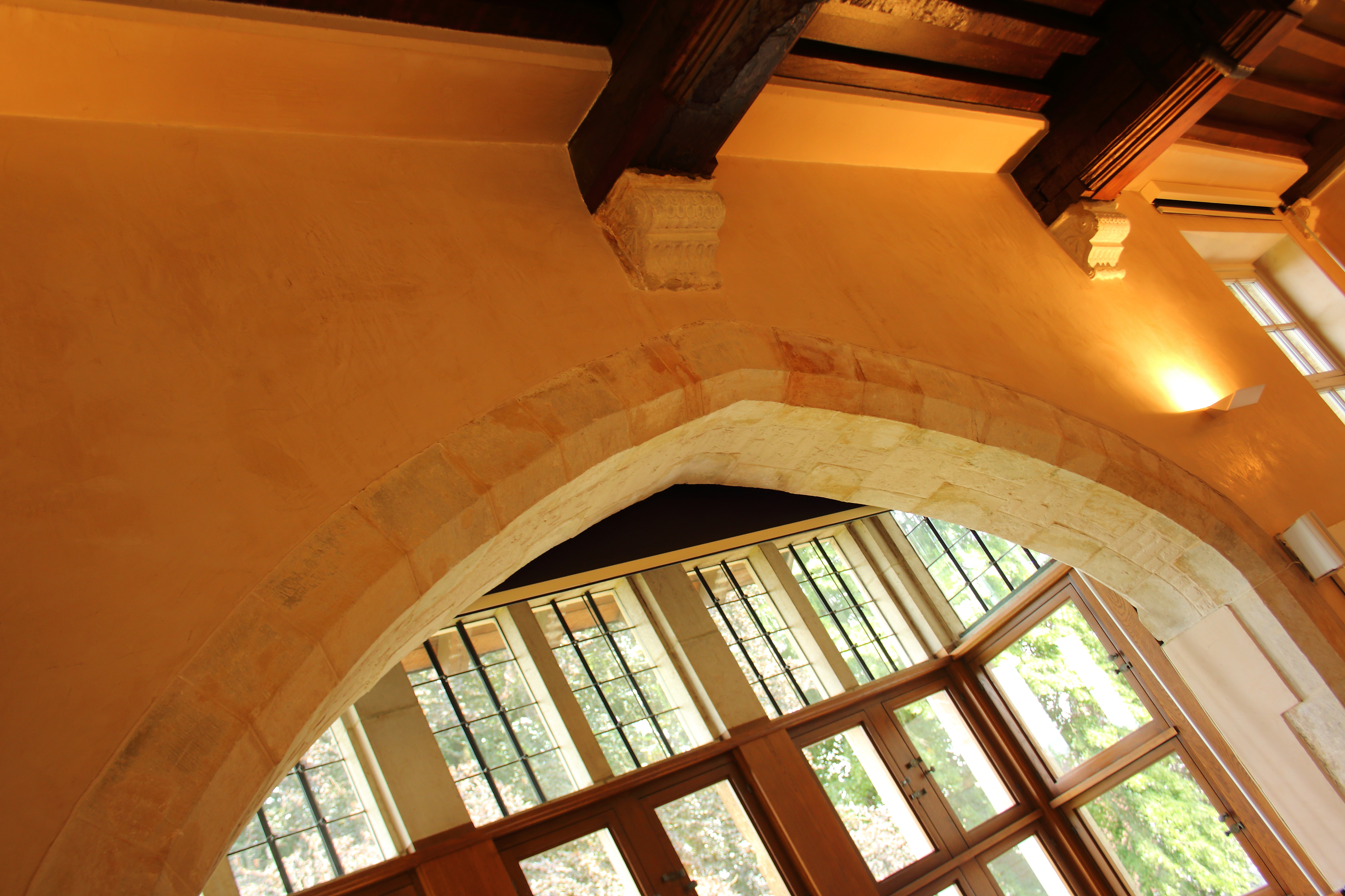 Egmontkasteel/ Kasteel van Egmont, Zottegem, Vlaanderen, België